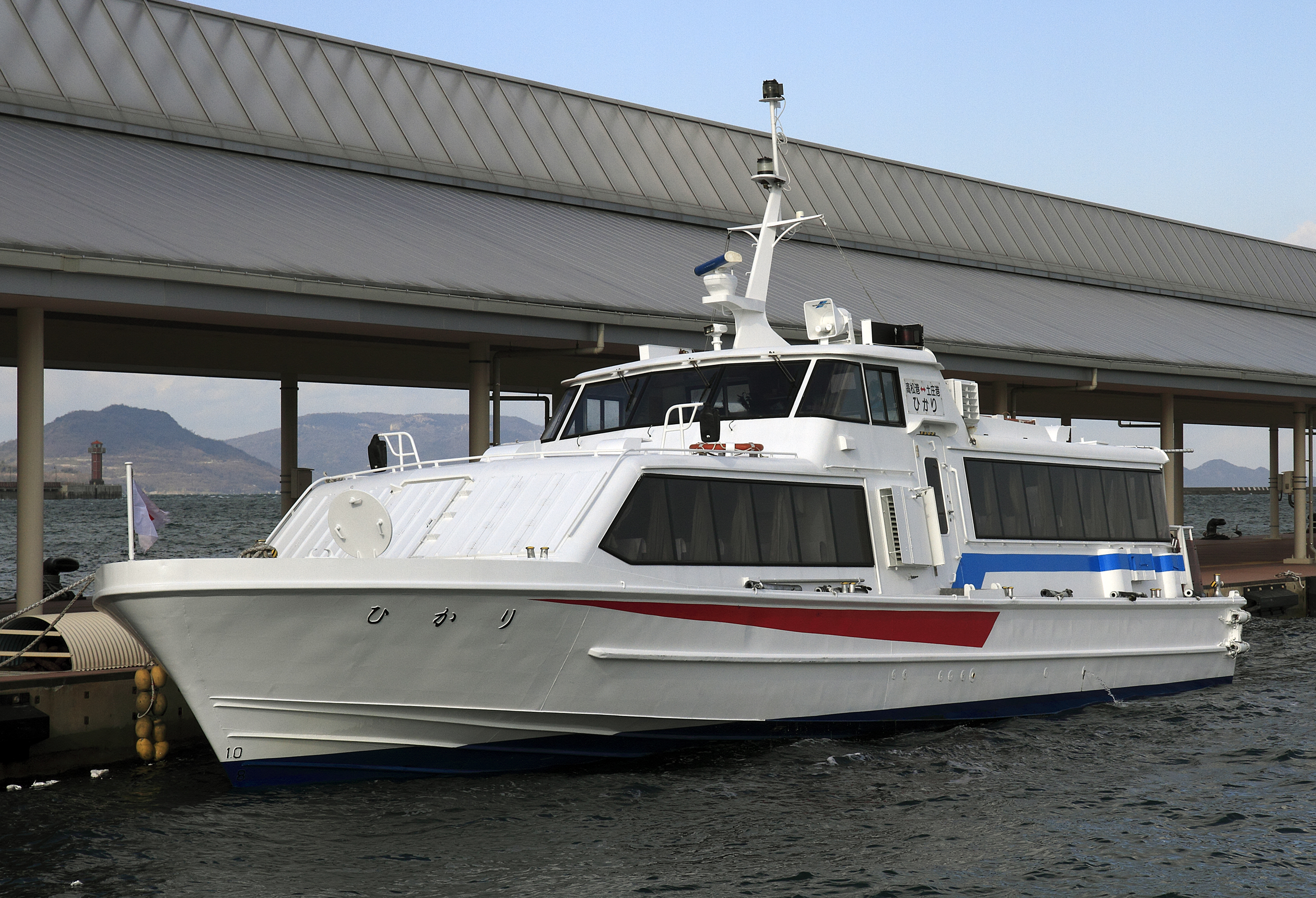 四国フェリー 高速艇 ひかり（2008年高松－土庄航路に就航）